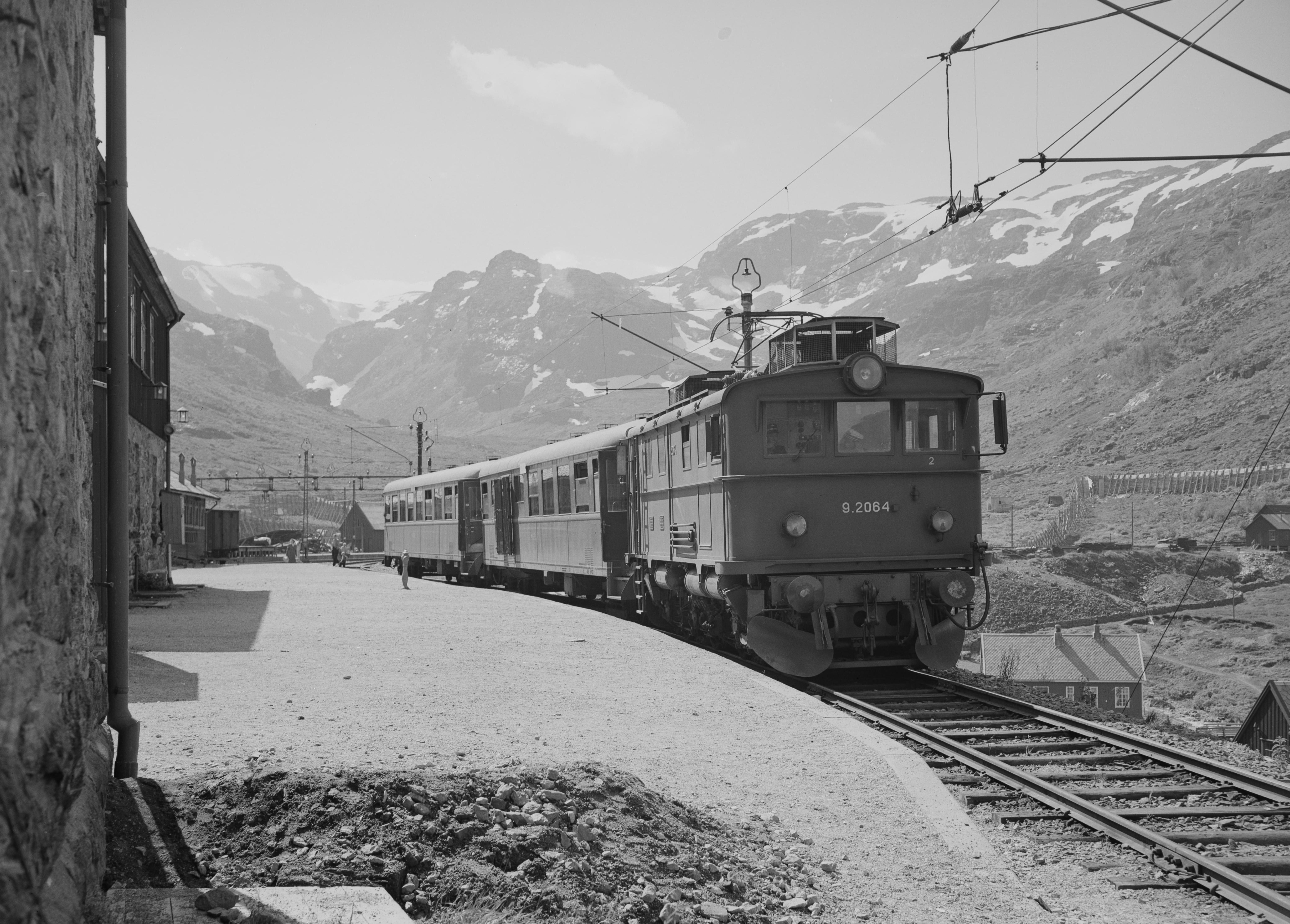 Bildet er hentet fra Nasjonalbibliotekets bildesamling. Anmerkninger til bildet var: fotograf :ukjent Myrdal, Aurland, Sogn og Fjordane